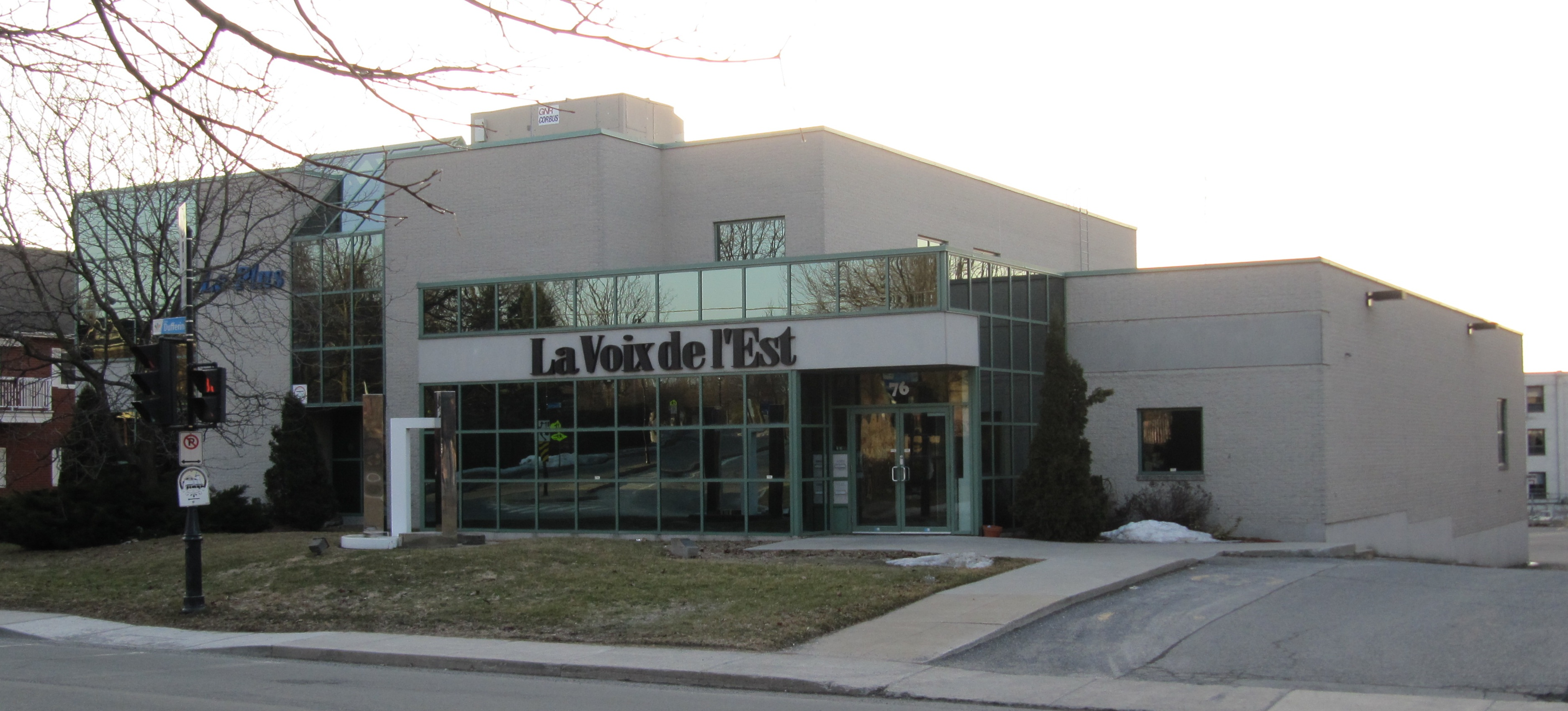 Bureaux du journal La Voix de l'Est de Granby et du journal Le Plus, mars 2012. Édifice construit en 1989.